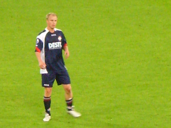 Danny Mathijssen, Nederlands profvoetballer, tijdens een uitwedstrijd van Willem II tegen FC Utrecht